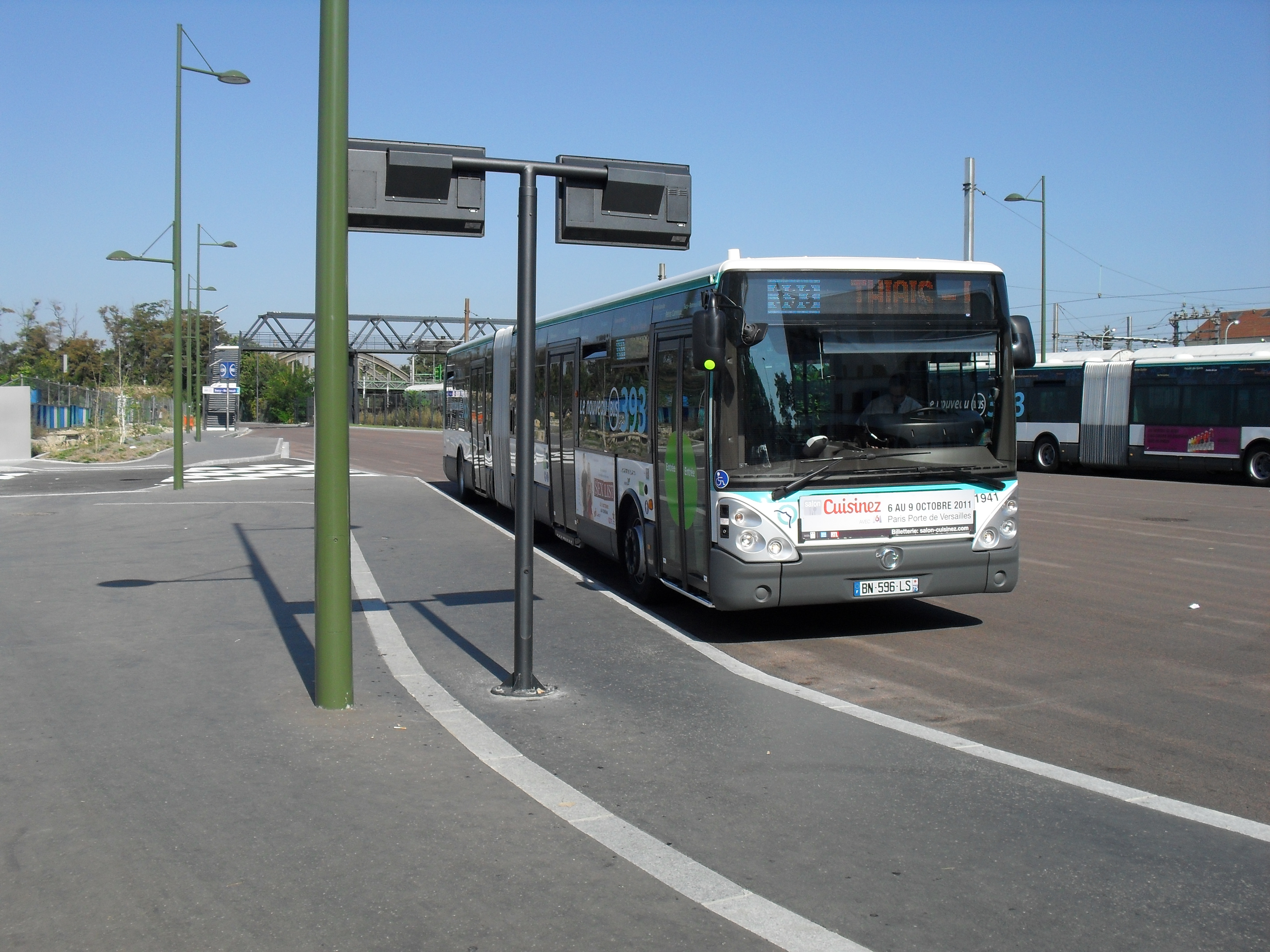 Citelis 18 du TCSP 393 au terminus "Sucy-Bonneuil"